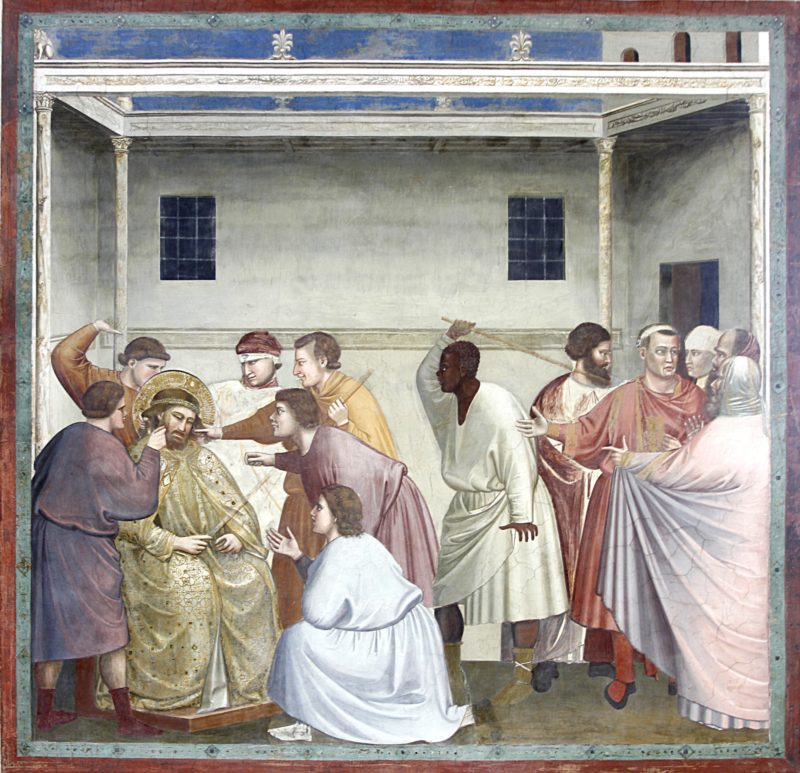 Capella dei Scrovegni - Padua